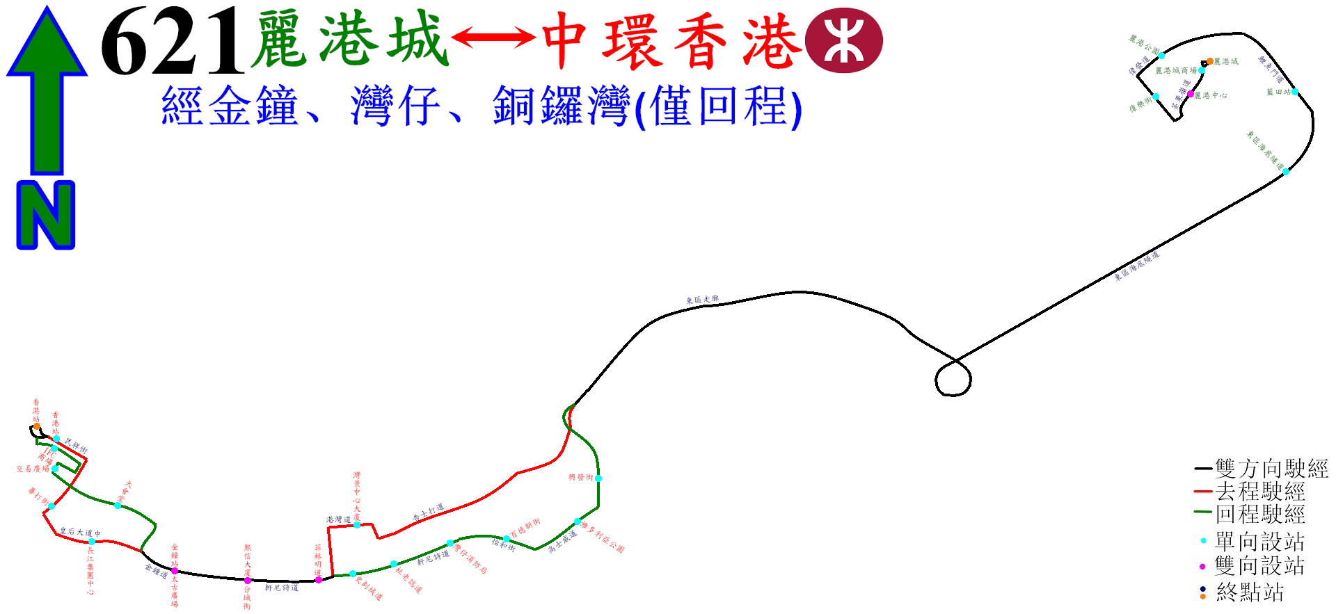 中文（香港）: 過海隧巴621線的走線圖